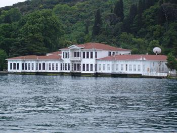 Yalı of en: Kıbrıslı Mehmed Emin Pasha in Kandilli, en: Boğaziçi, Istanbul, Turkey